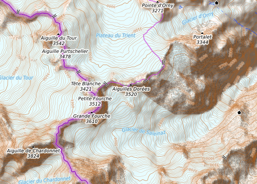 carte réalisée sur umap This map may be incomplete, and may contain errors. Don't rely solely on it for navigation.